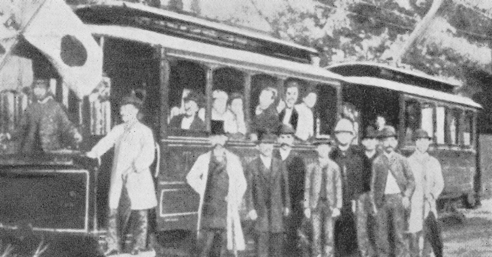 第3回内国勧業博覧会に展示されたスプレーグ式電車